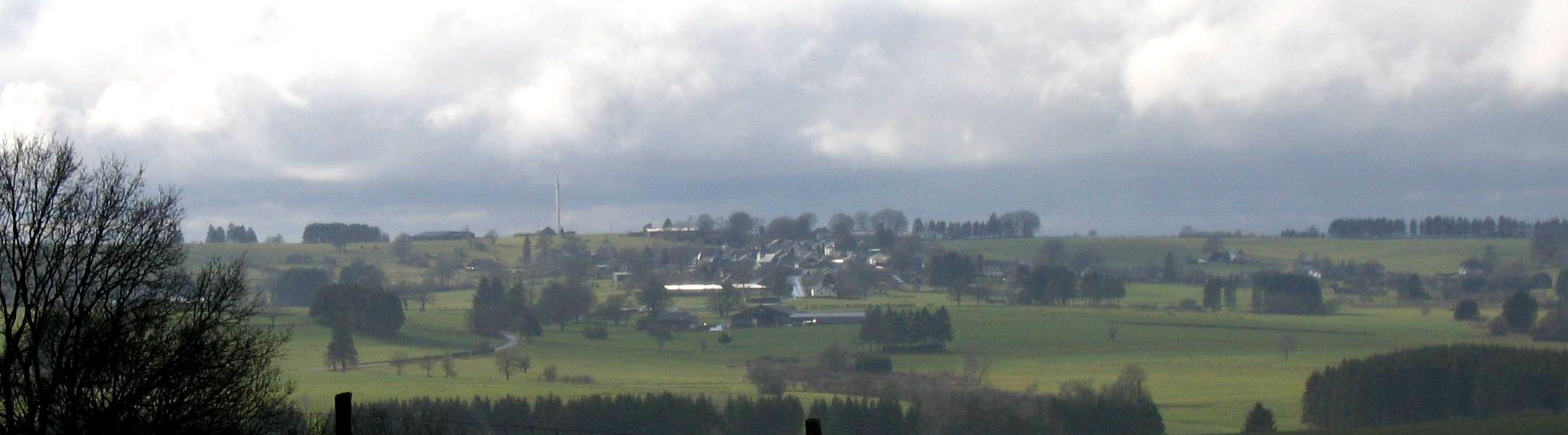 Aldringen.